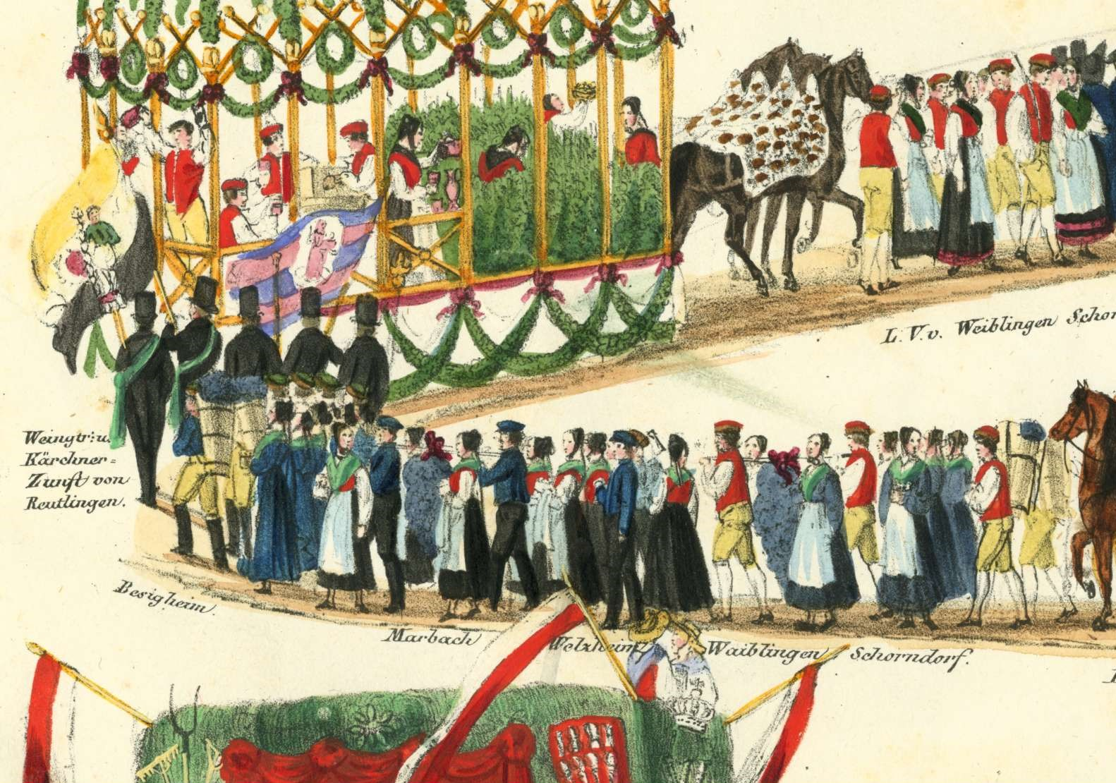 Festzug der Württemberger am 28.9.1841 zum 25-jährigen Regierungsjubiläum von König Wilhelm I.